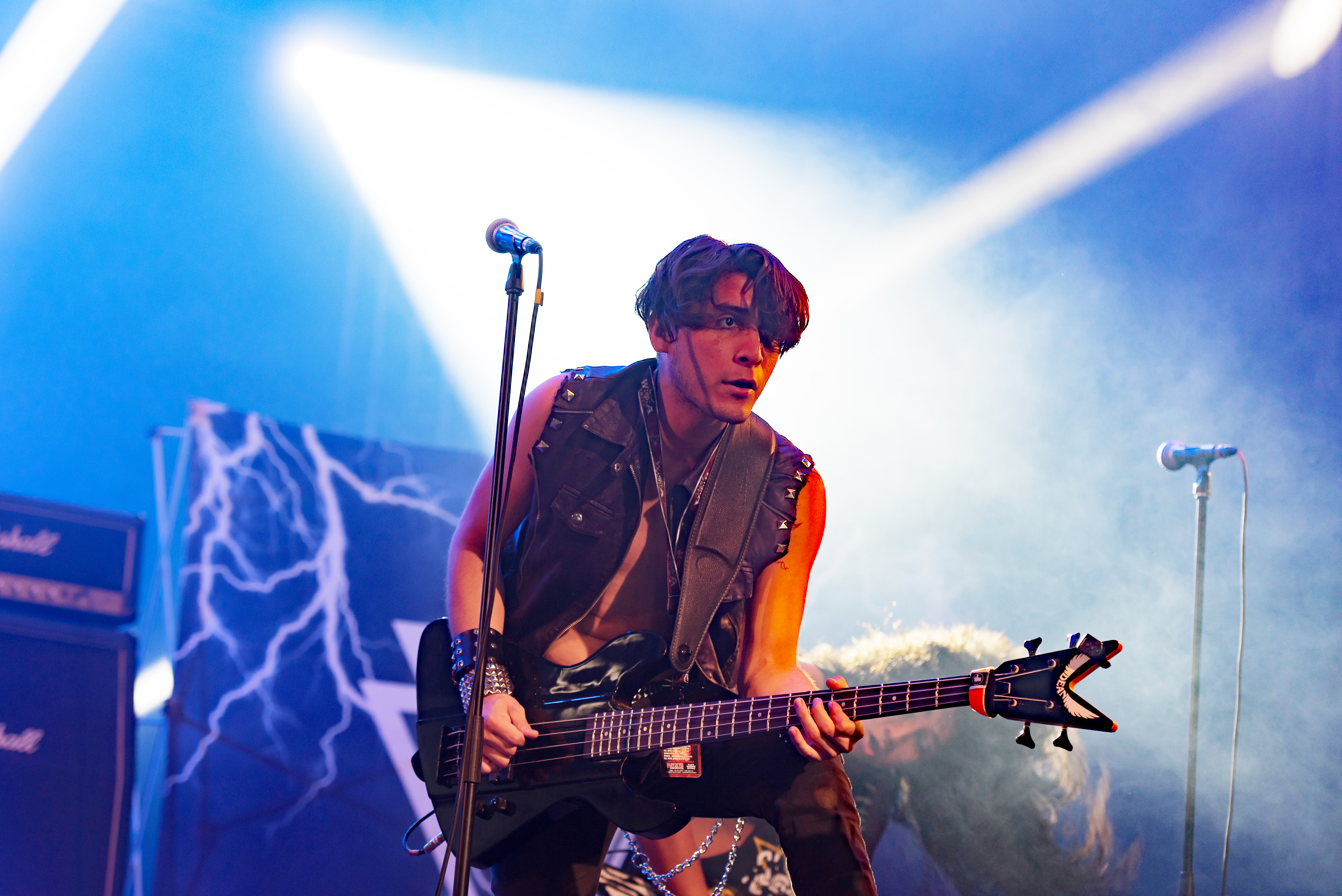 Jet Jaguar beim Wacken Open Air 2017